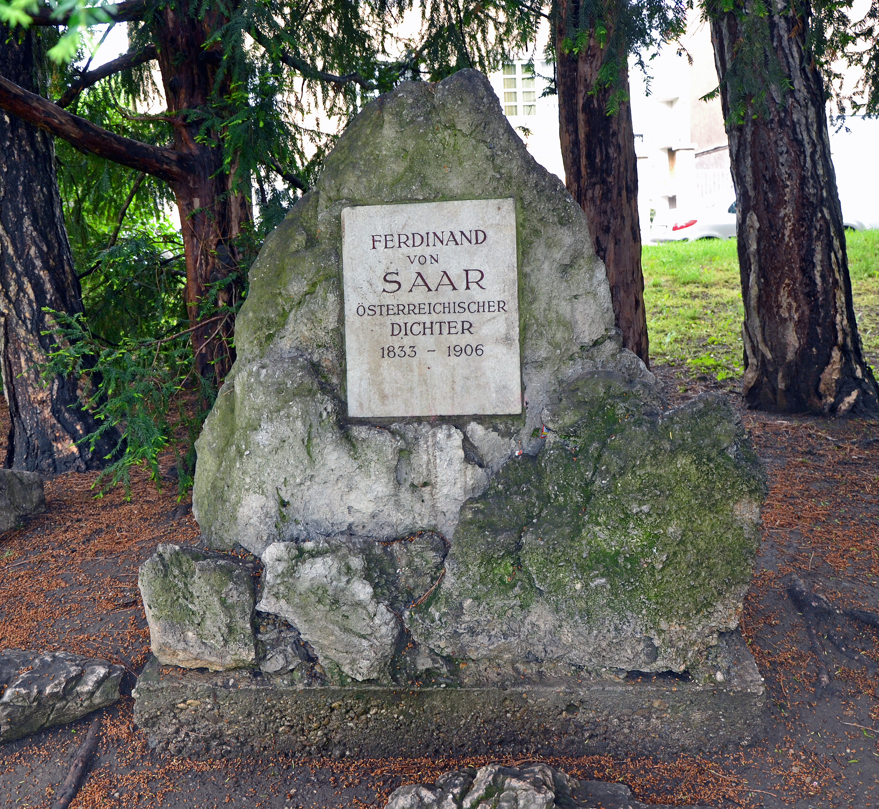 Ferdianand von Saar - Denkmal